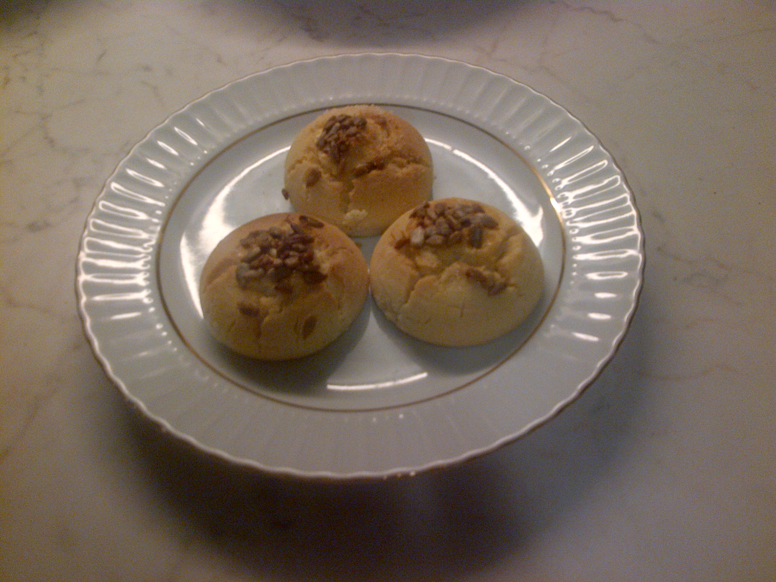 Un plato de un kurabiyesi, decorados con maravillas.